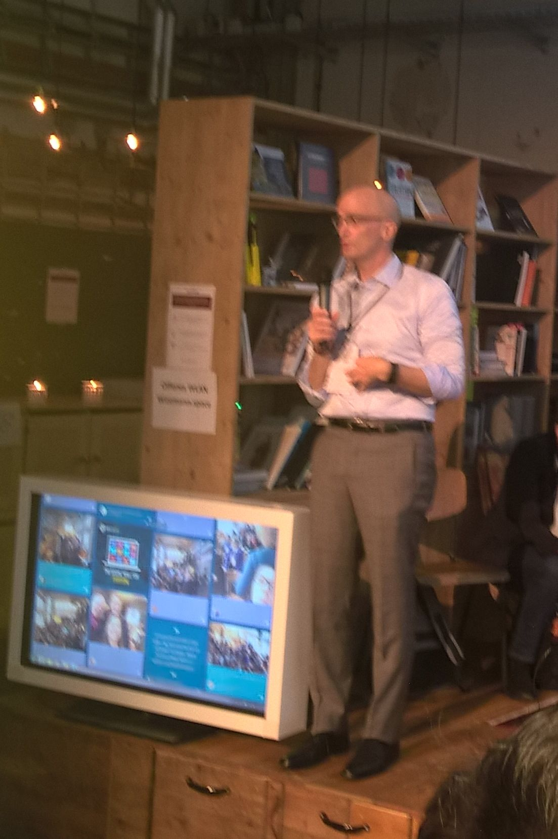 John Stepper, Autor von Working out Loud, beim WOLCamp'17 in Stuttgart